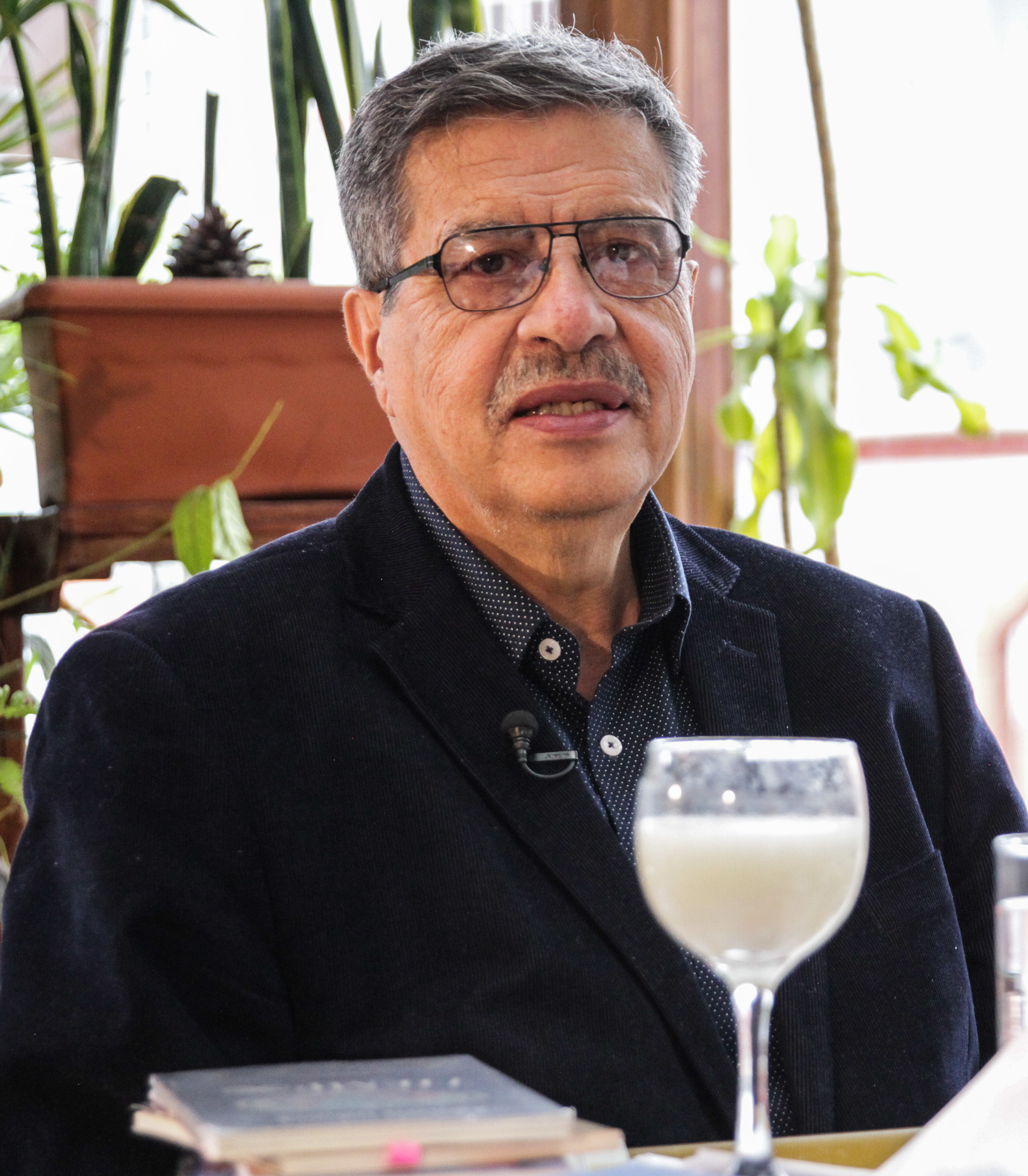 Quito 6 Sept (ANDES).- El escritor Abdón Ubidia fue entrevistado en el programa "El Otro Lado De" conducido por Marco Antonio Bravo. Fotografías: Diana Cuenca / ANDES ABDÓN UBIDIA / EL OTRO LADO DE Quito 6 Sept (ANDES).- El escritor Abdón Ubidia fue entrevistado en el programa "El Otro Lado De" conducido por Marco Antonio Bravo. Fotografías: Diana Cuenca / ANDES